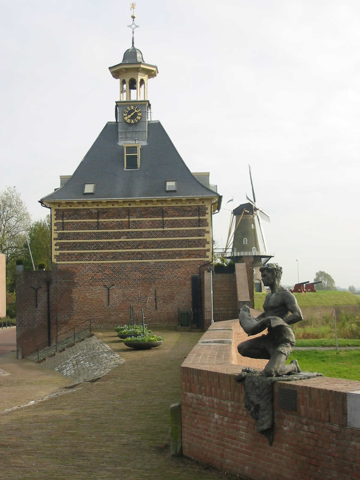 Dalem Poort in Gorinchem met het beeld de Zalmvisser door Marcus Ravenswaaij uit 1992